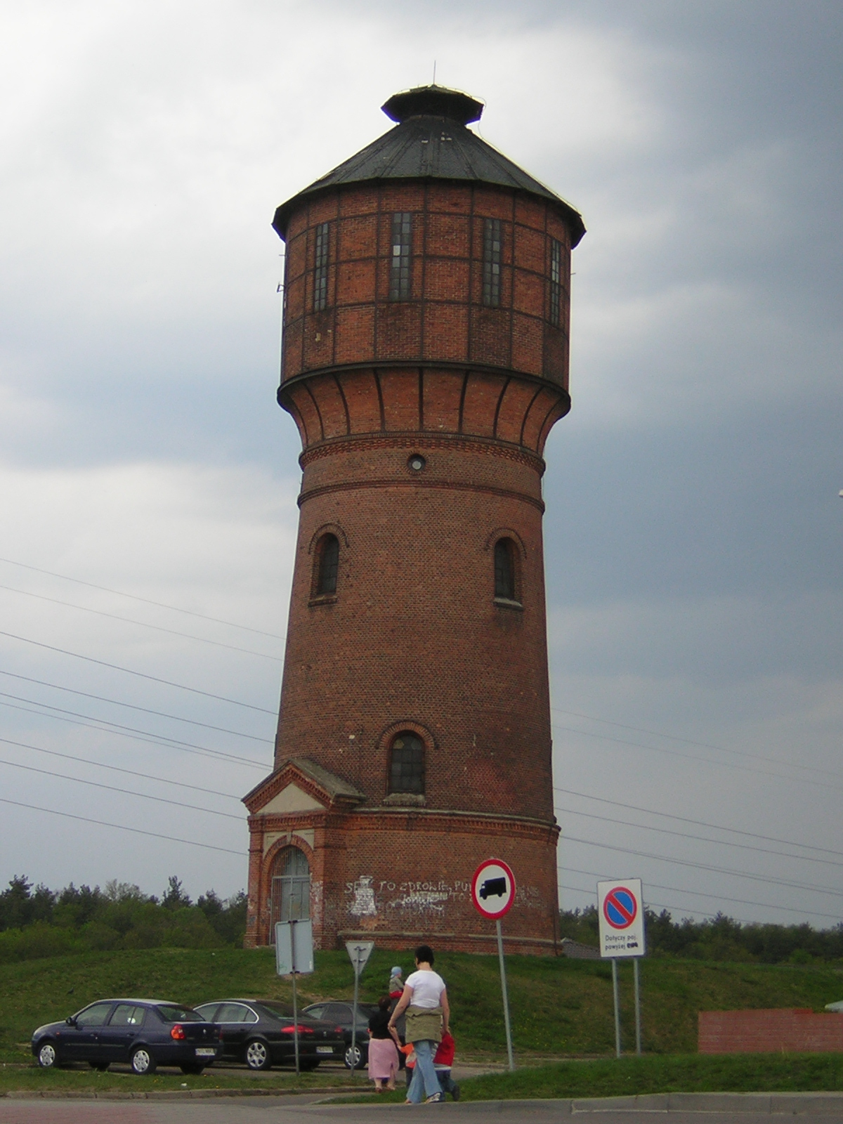 Neogotycka wodociągowa wieża ciśnień w Iławie przy ul. 1 Maja. 03.1987.